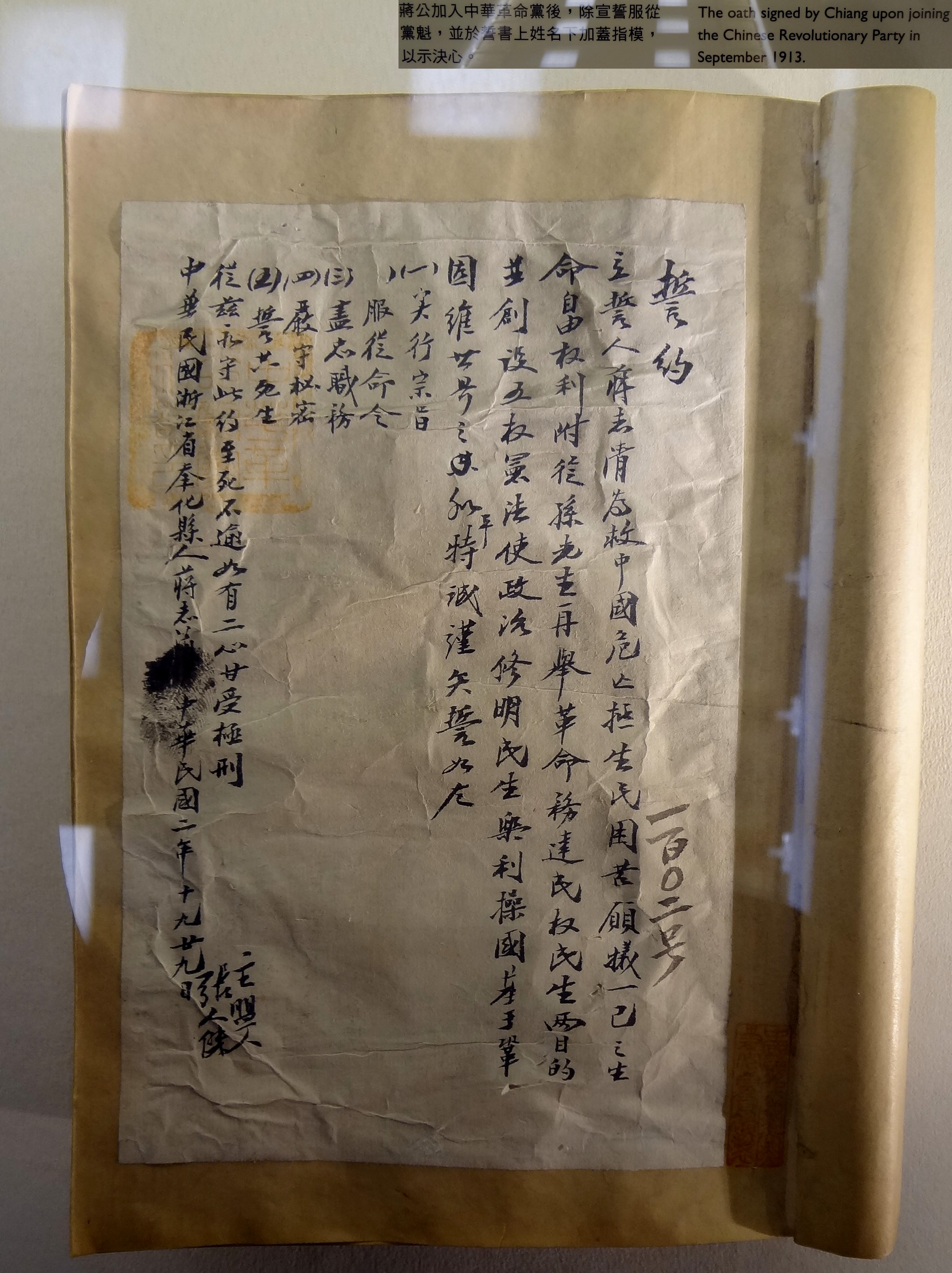 國立中正紀念堂展示的1913年（中華民國2年）10月29日蔣志清（蔣中正）誓約，宣誓服從中華革命黨黨魁。